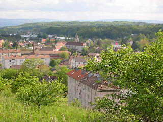 Paysage ville de Danjoutin (Territoire de Belfort) Photo prise le 7 mai 2004 par LP90 Licence GFDL LP90